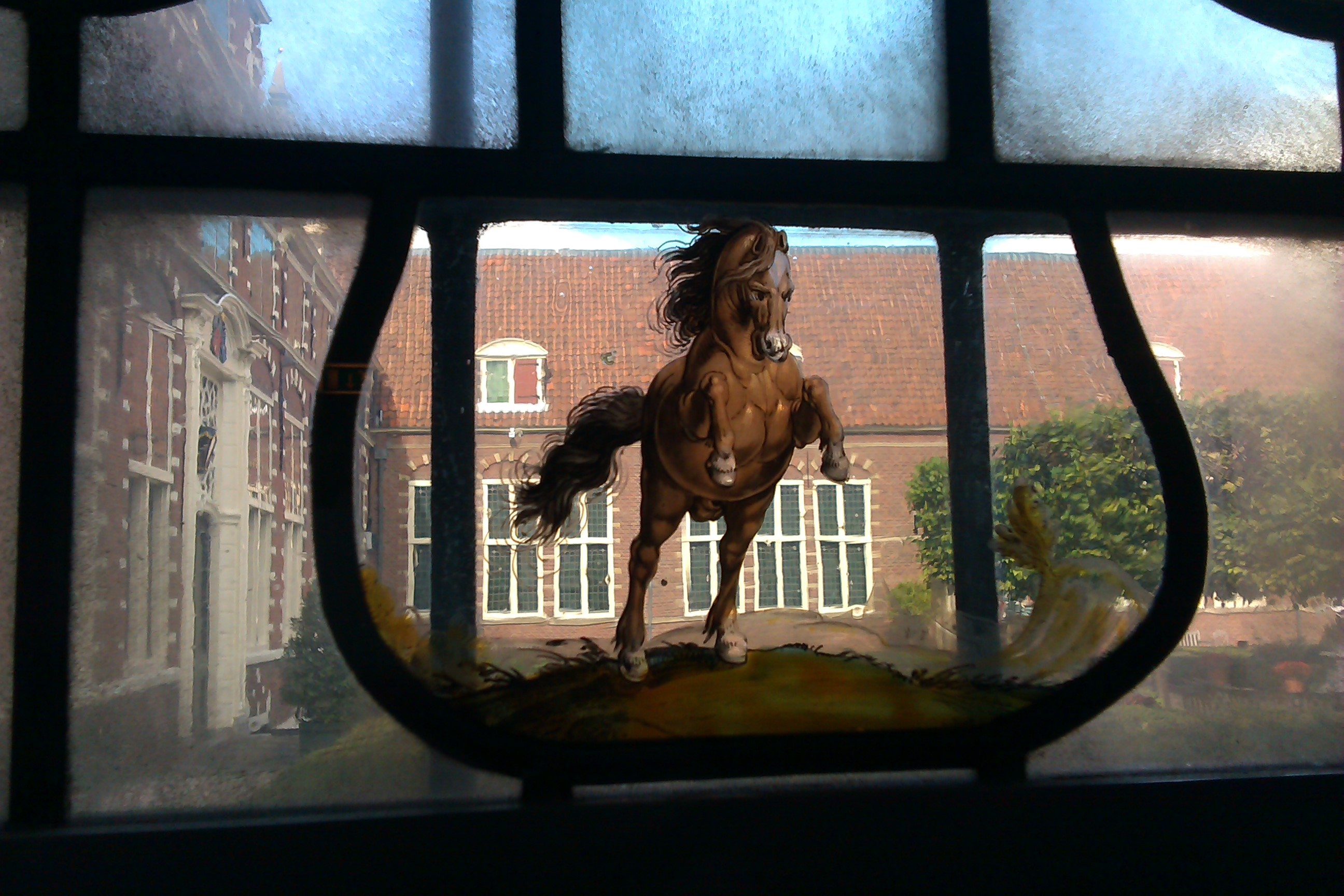 Oudemannenhuis thans Frans Hals Museum